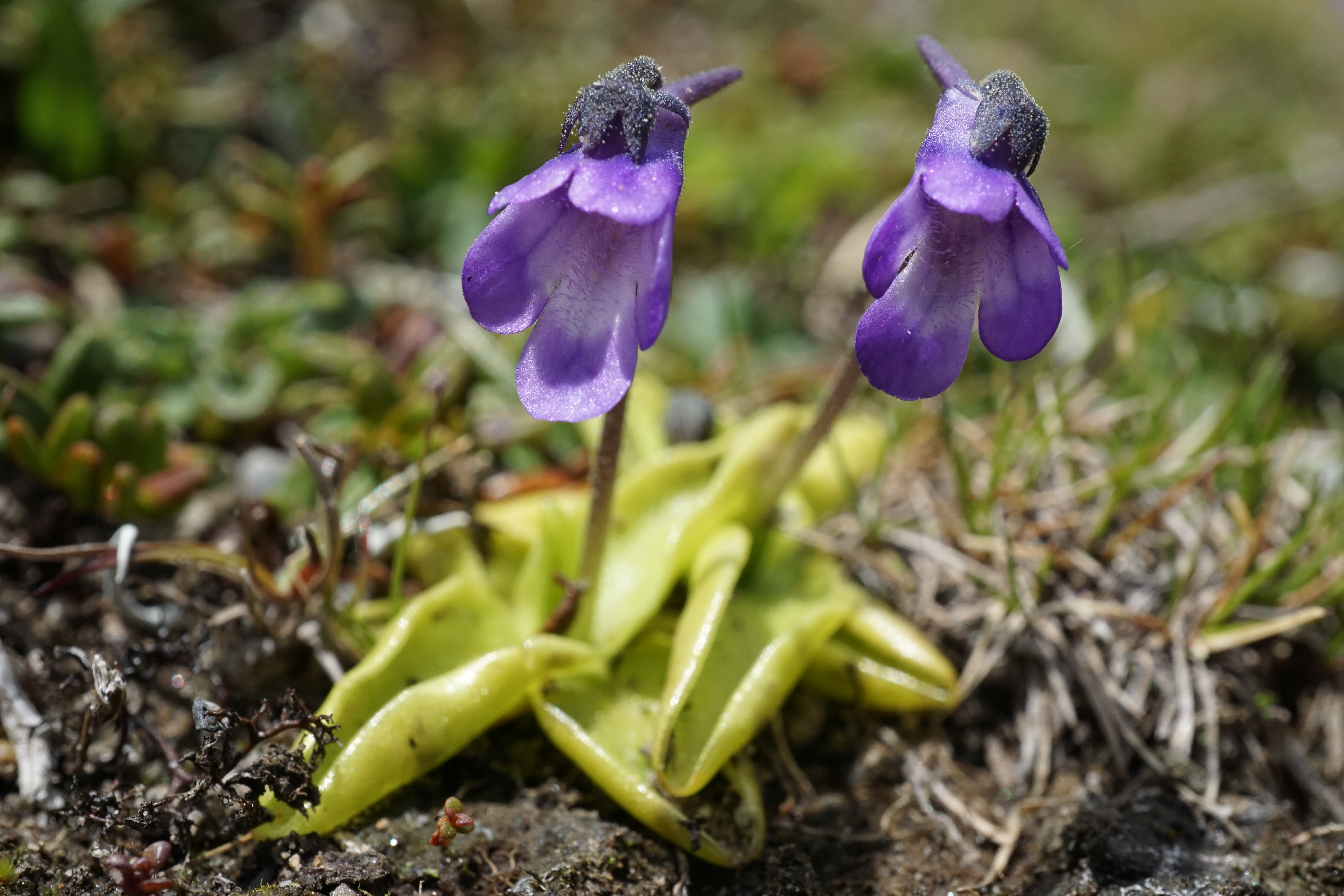 common butterwort gemeines Fettkraut